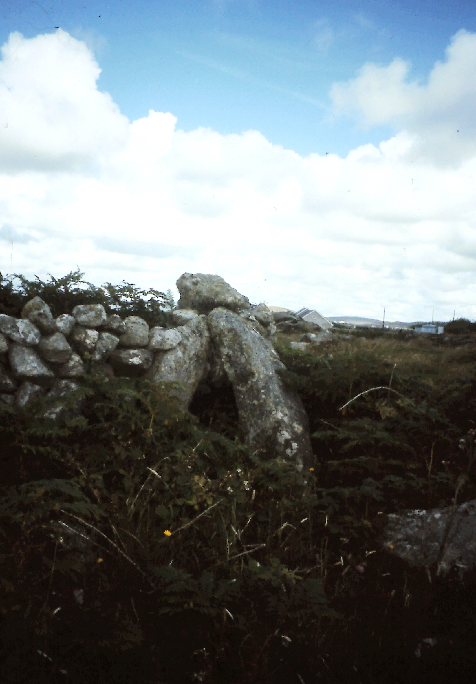 Portal Tomb von Roshin South